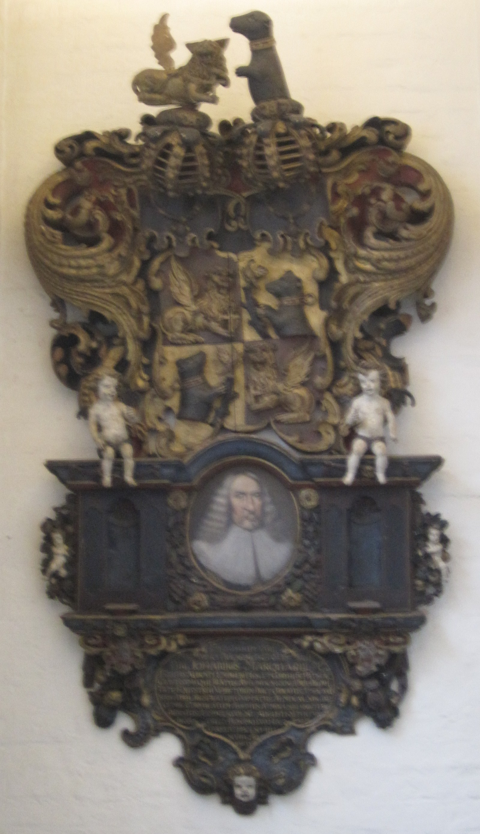 Epitaph des Bürgermeisters Johann Marquard (1610-1668), vormals St. Petri in Lübeck, nunmehr St. Annen Museum, Lübeck